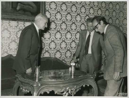 Il presidente della Camera dei Deputati Pietro Ingrao riceve il professor Giorgio Tecce